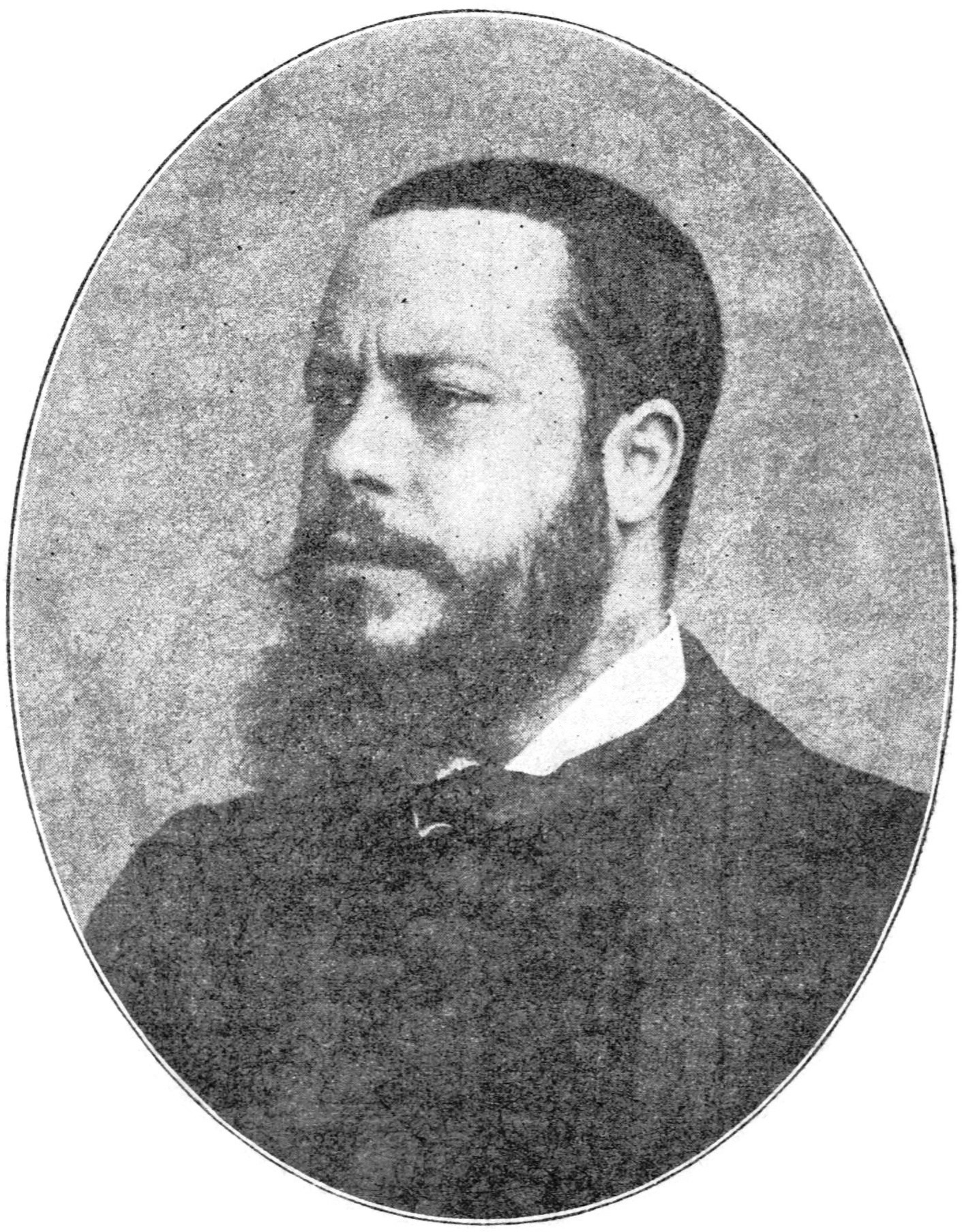 "Ernest Billiet, collaborateur à la France Libre".